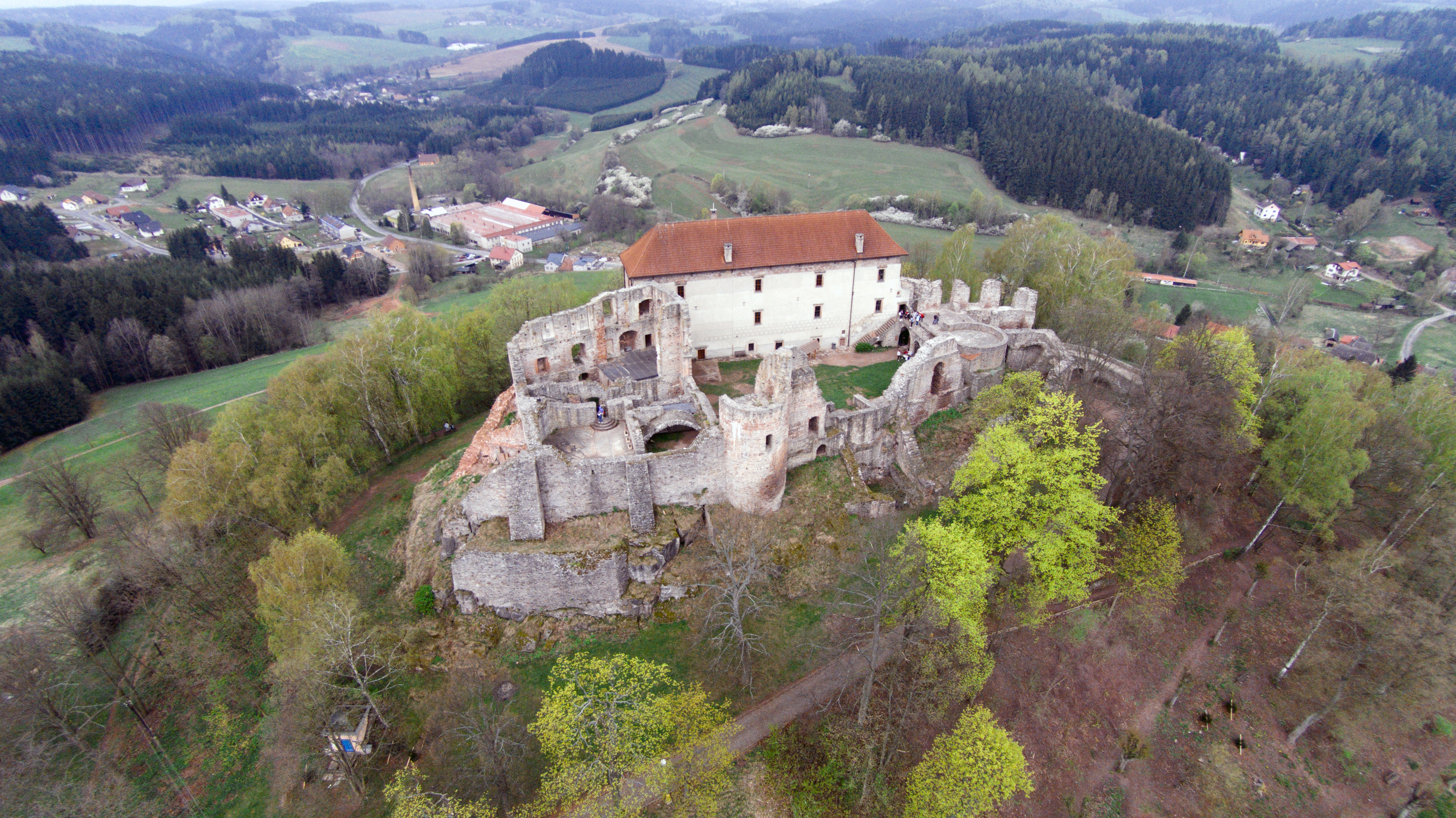 Letecký pohled na Hrad Pecka